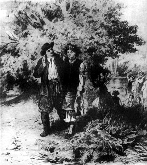 Рисунок К. Трутовского к рассказу А. П. Чехова «Троицын день».